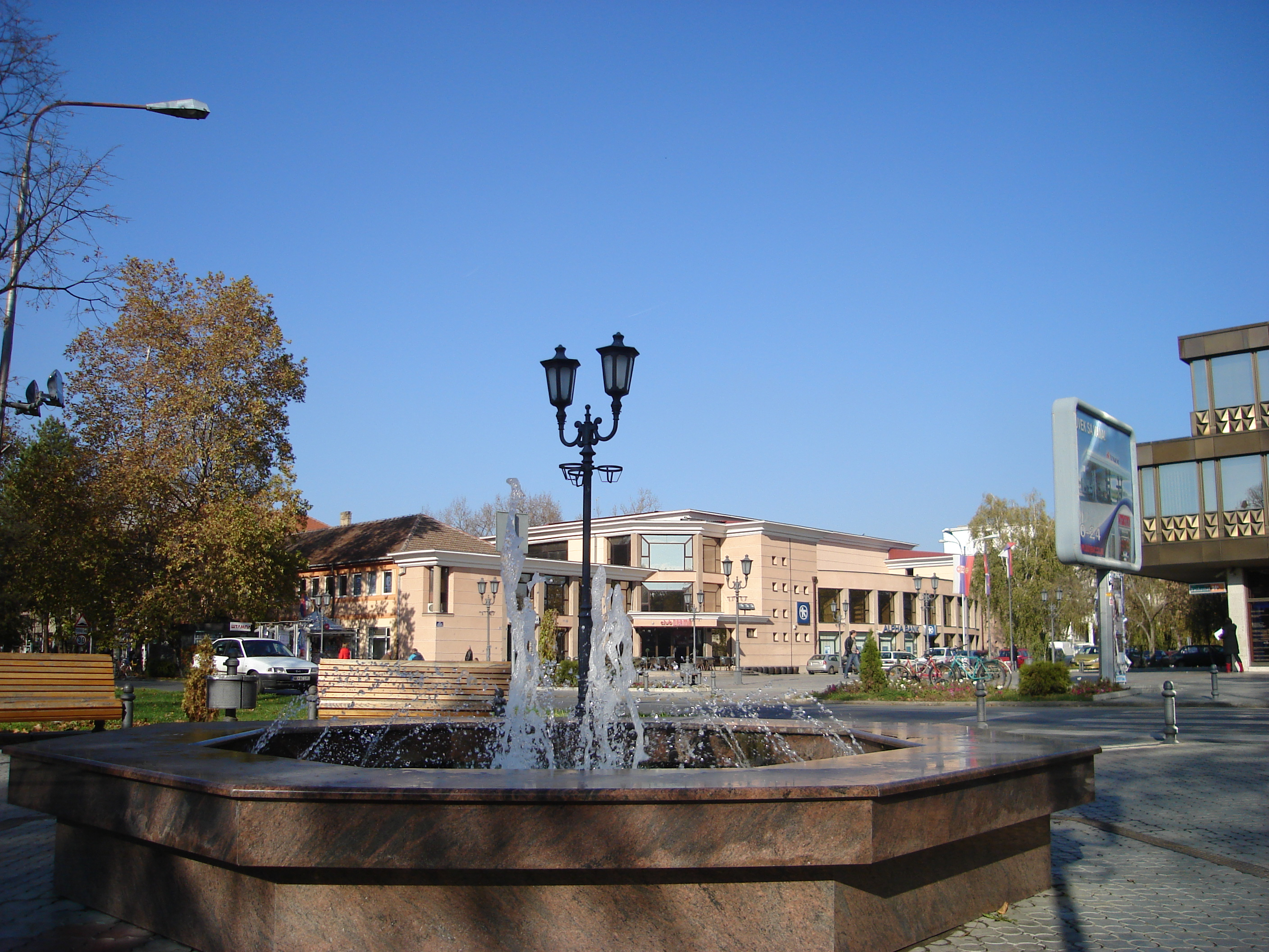 Фонтана у центру Врбаса...